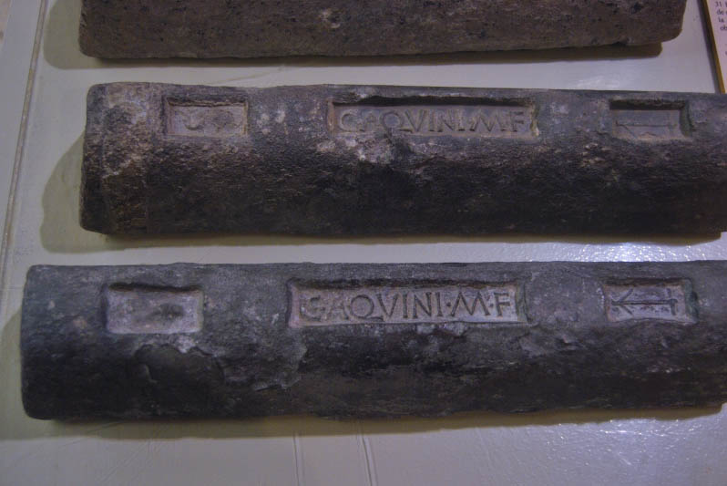 Lingotes de plomo de época romana, procedentes de las minas de Carthago Nova (Cartagena, España). Museo Arqueológico Municipal de Cartagena. ELRH-SP 4: C(ai) Aquini M(arci) f(ilii).